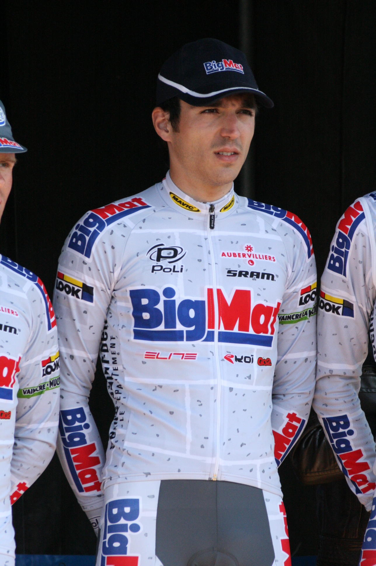 Romain Lemarchand, lors de la présentation des équipes des 4 jours de Dunkerque 2010